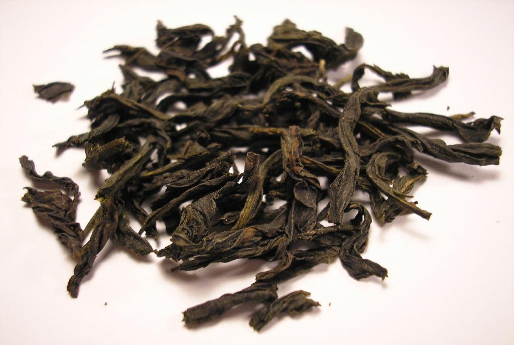 Bu Zhi Chun